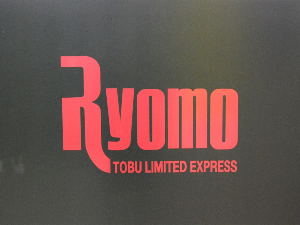 東武200系電車・特急りょうもう車体側面エンブレム（2008-10-4・浅草にて撮影）